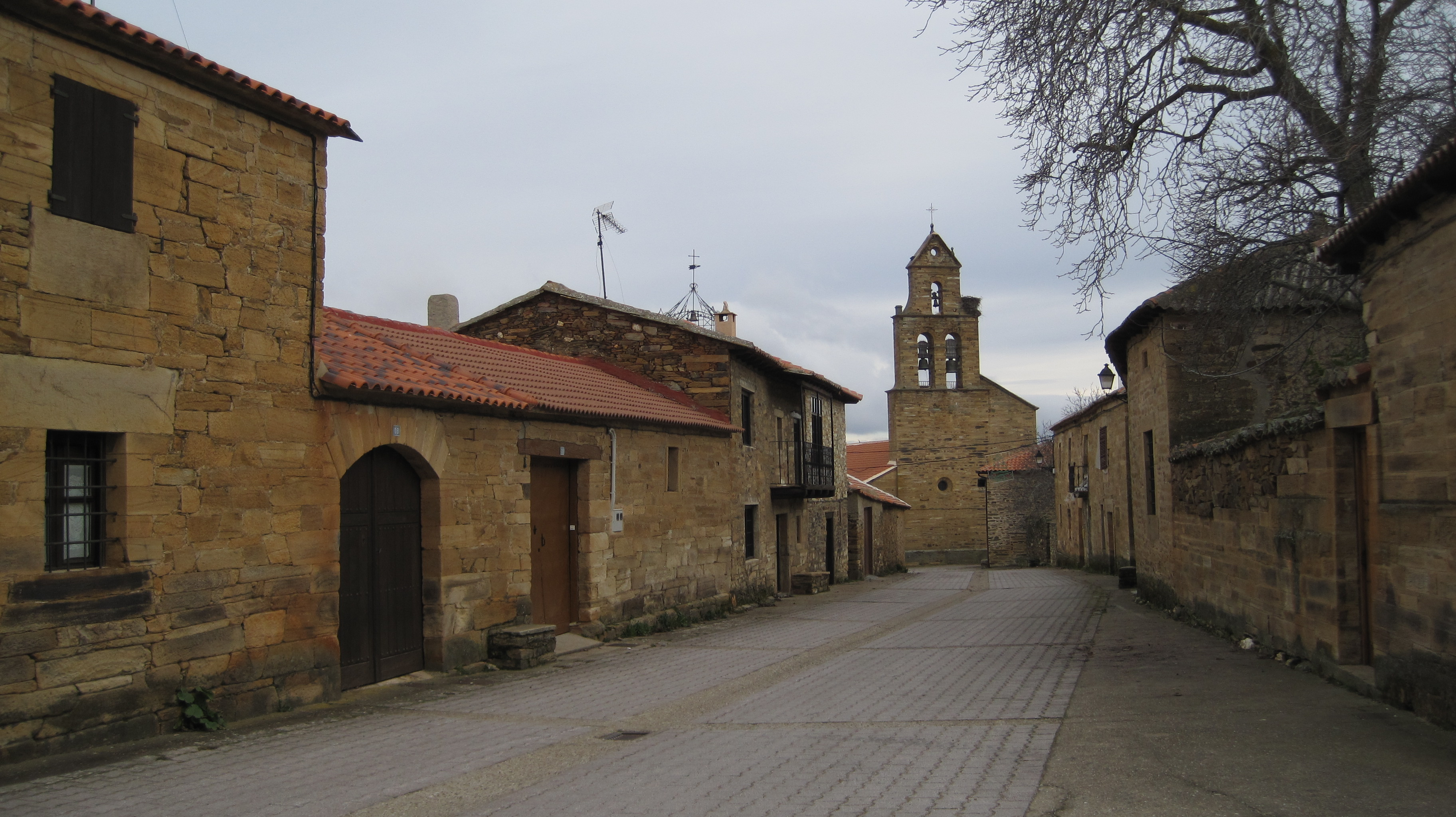 Vista de una calle de Quintanilla de Somoza (Luyego, León, España).